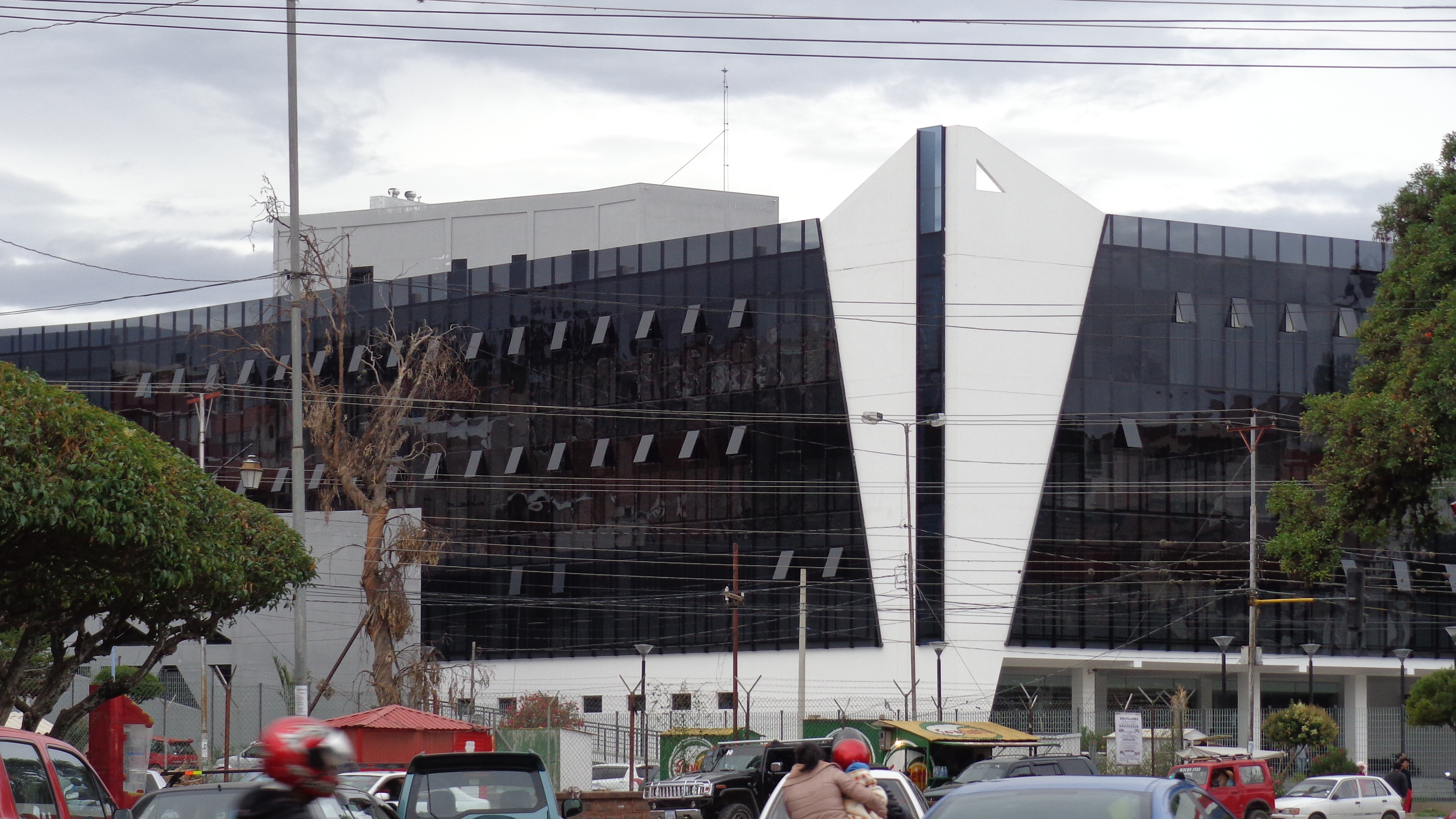 Tribunal Departamental de Justicia de Chuquisaca-Bolivia